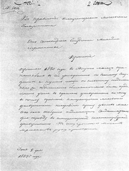 Прошение М. Ю. Лермонтова в правление Московского университета об увольнении из числа студентов